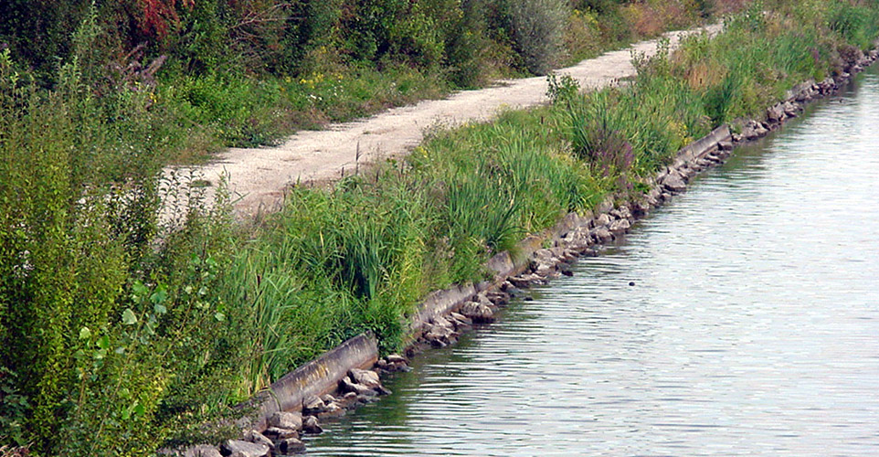 Expérience-test de corridor biologique à vocation de lagunage naturel linéaire, le long du chemin de halage (Lieu dit Pont Asquin, rive droite). il s'agit d'un travail collaboratif entre VNF, un Agriculteur local, la fédération Nord Nature et le Conseil Régional, qui a été un succès avant d'être rasé et comblé par erreur par une entreprise chargée de l'entretien du chemin, puis dégradé par un apport de déchets (laitier métallurgique) industriels sur le cheminLe Canal de Noeufossé, de "Neufossé" ou "Canal du Bassin minier" est sur une grande partie de son tracé un cours d'eau totalement artificiel (et non une rivière qui a été canalisée). Rem : Ce canal a originellement été créé non pas d'abord pour relier le fleuve côtier de l'Aa du Pas de Calais à la rivière de la Lys (dans le nord), entre les communes de Saint-Omer et d'Aire-sur-la-Lys, mais pour des raisons de stratégie militaire défensive, peu après l'an 1000. Il constitue la plus grande partie du "Canal Dunkerque-Escaut". Rem : les rochers déposé le long de la berge la protège des déchaussements par le Rat musqué, et permettent à de gros animaux tombés à l'eau de remonter (ce canal est une des grandes infrastructures responsable de fragmentation écologique de cette région.